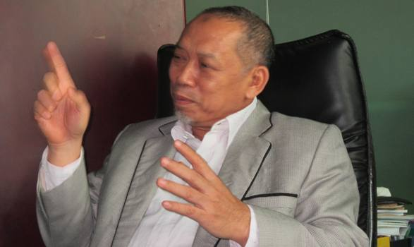 Pembina Yayasan Kafila